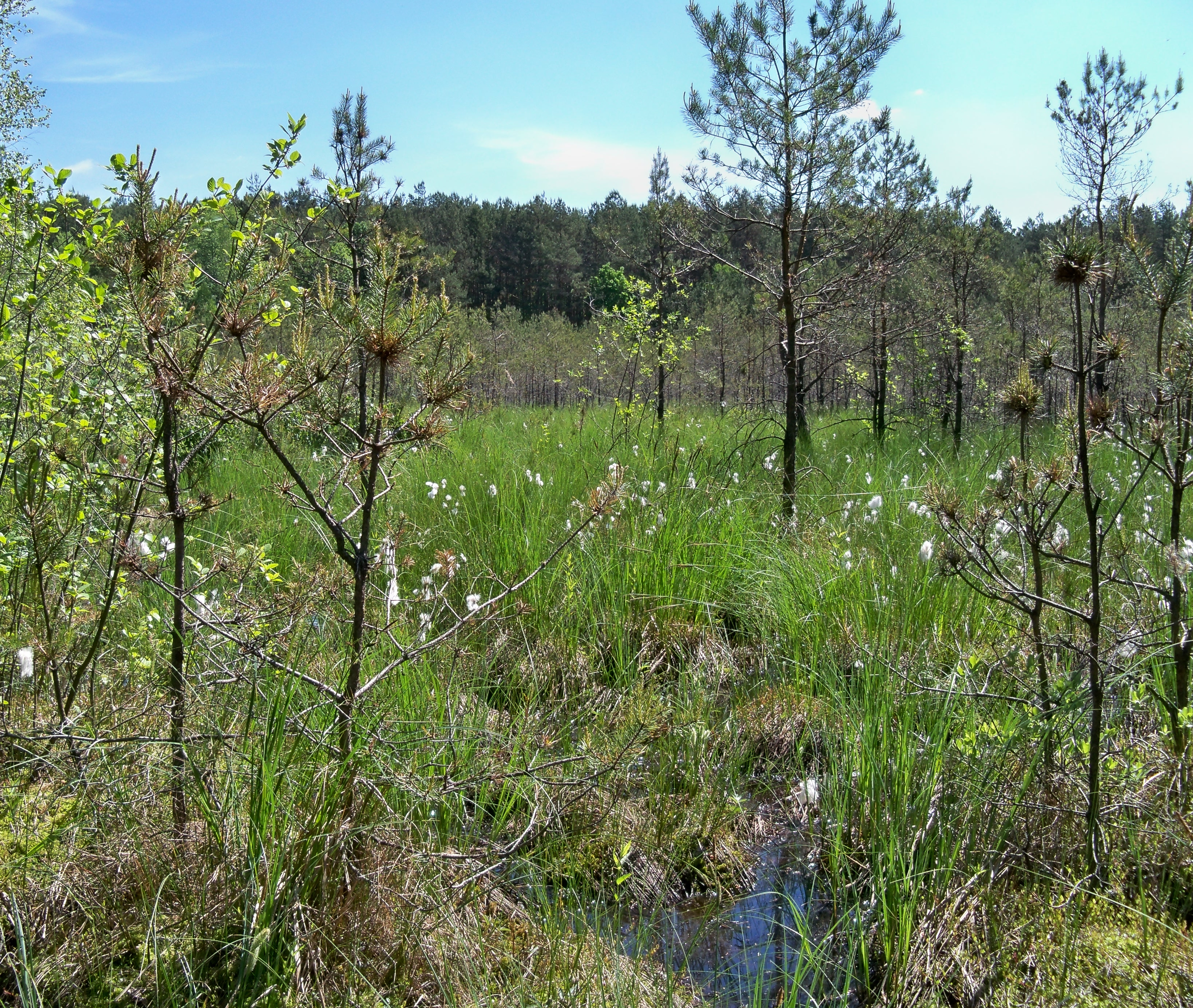 Bagno Żurawieniec między Krzywdą a Rudą (powiat zwoleński). Torfowisko przejściowe.